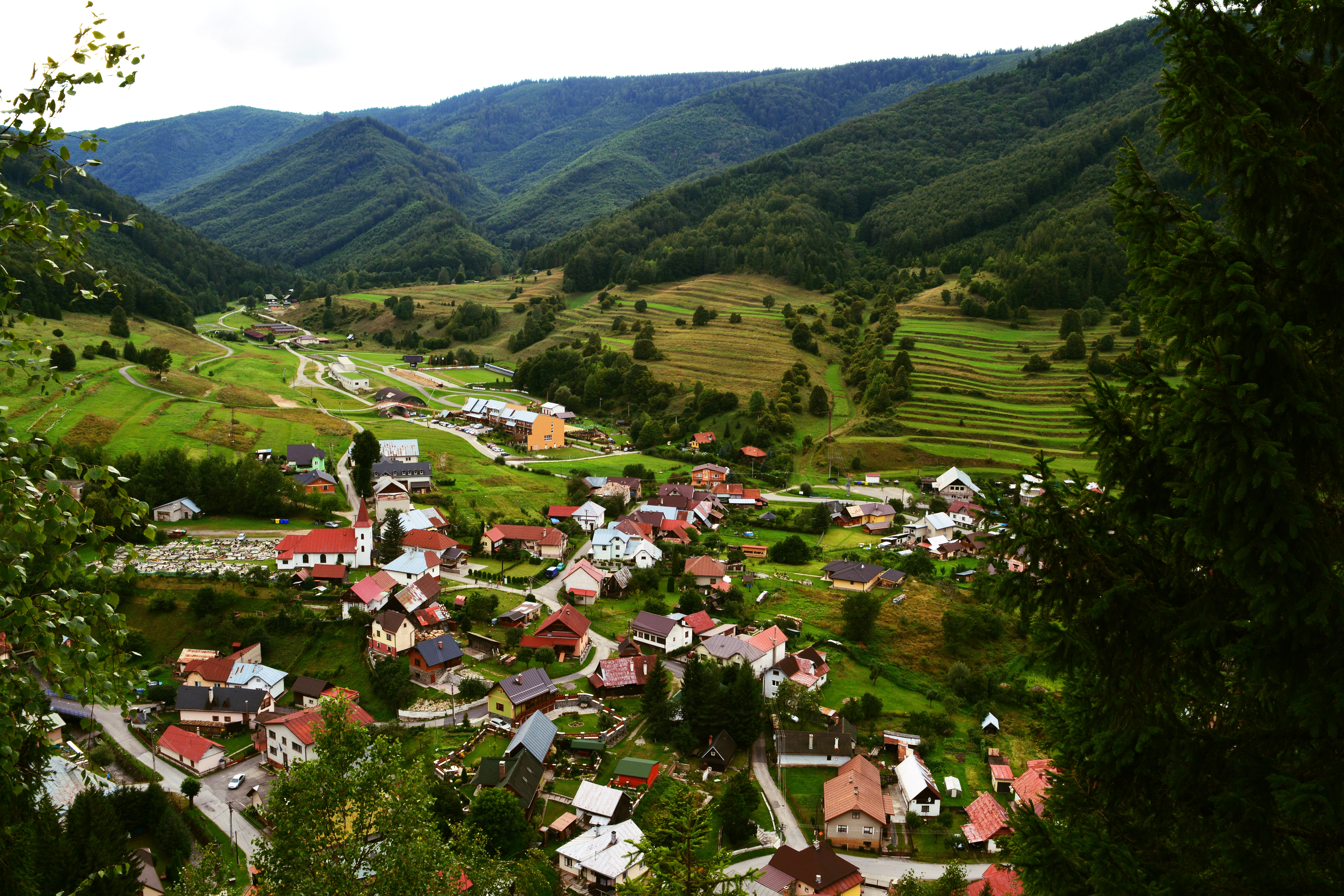 Pohľad na Osrblie.